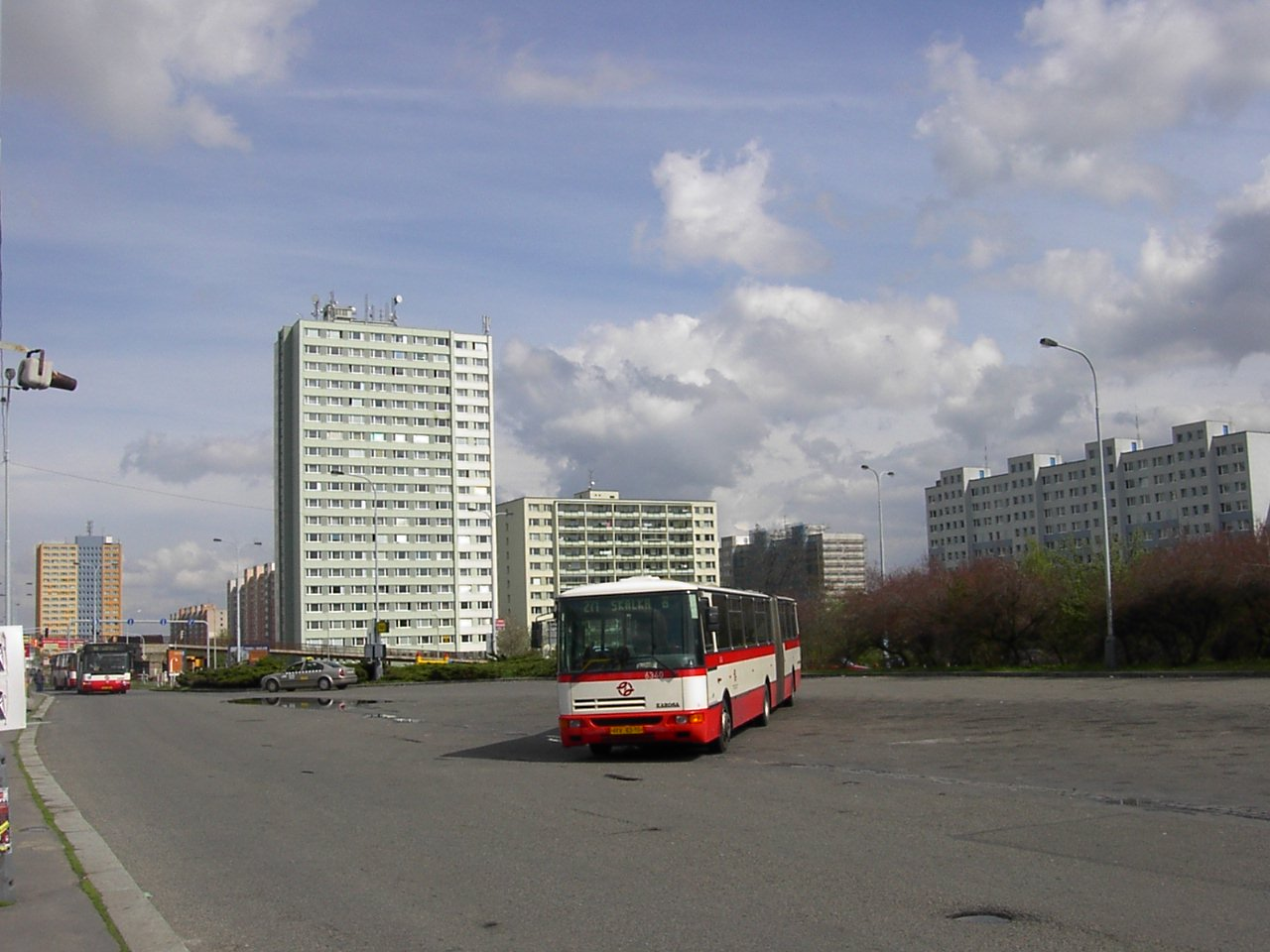 Terminál BUS u metra Háje a Opatovská ulice.